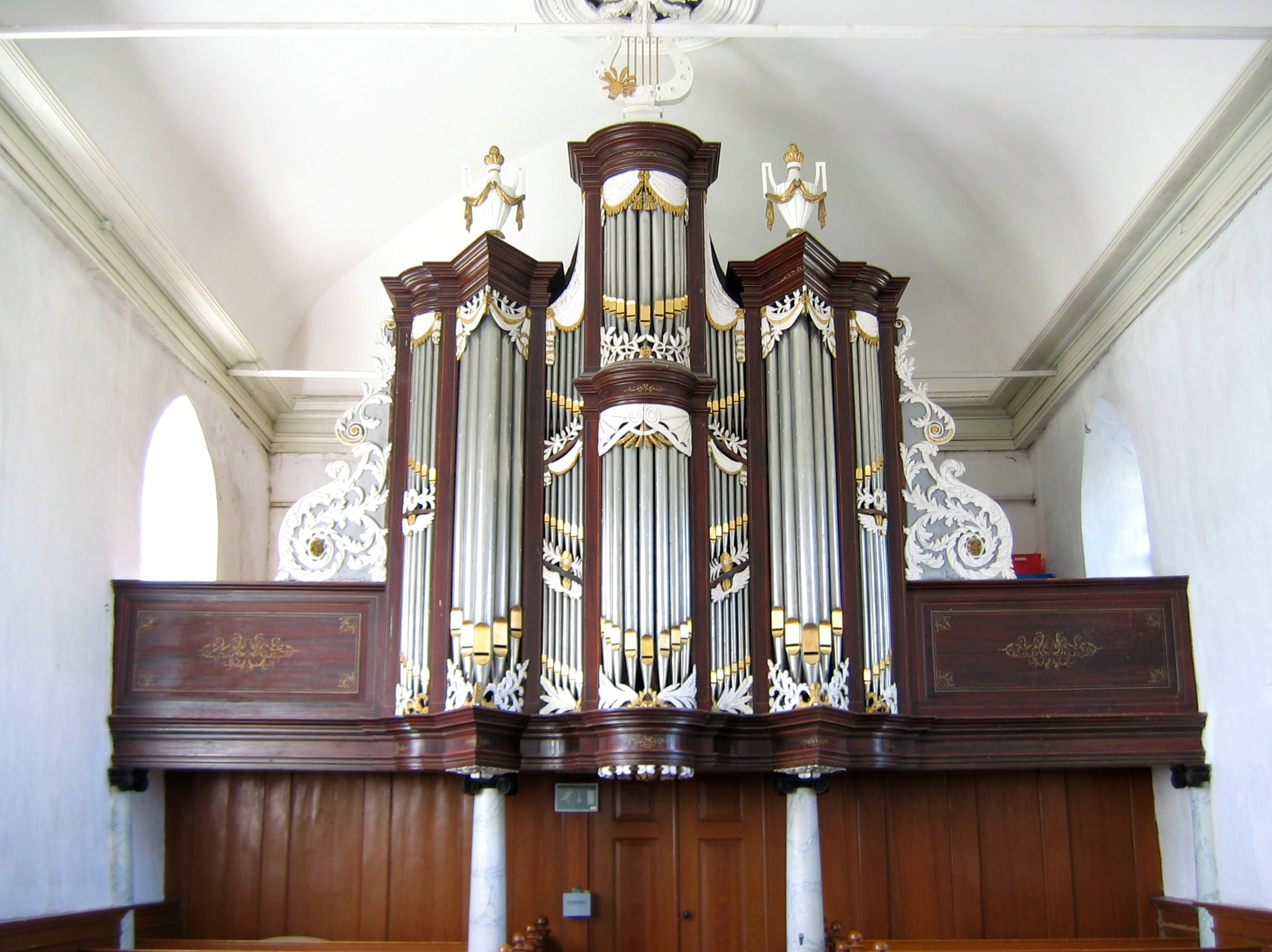 Orgel in Saaxumhuizen, Niederlande